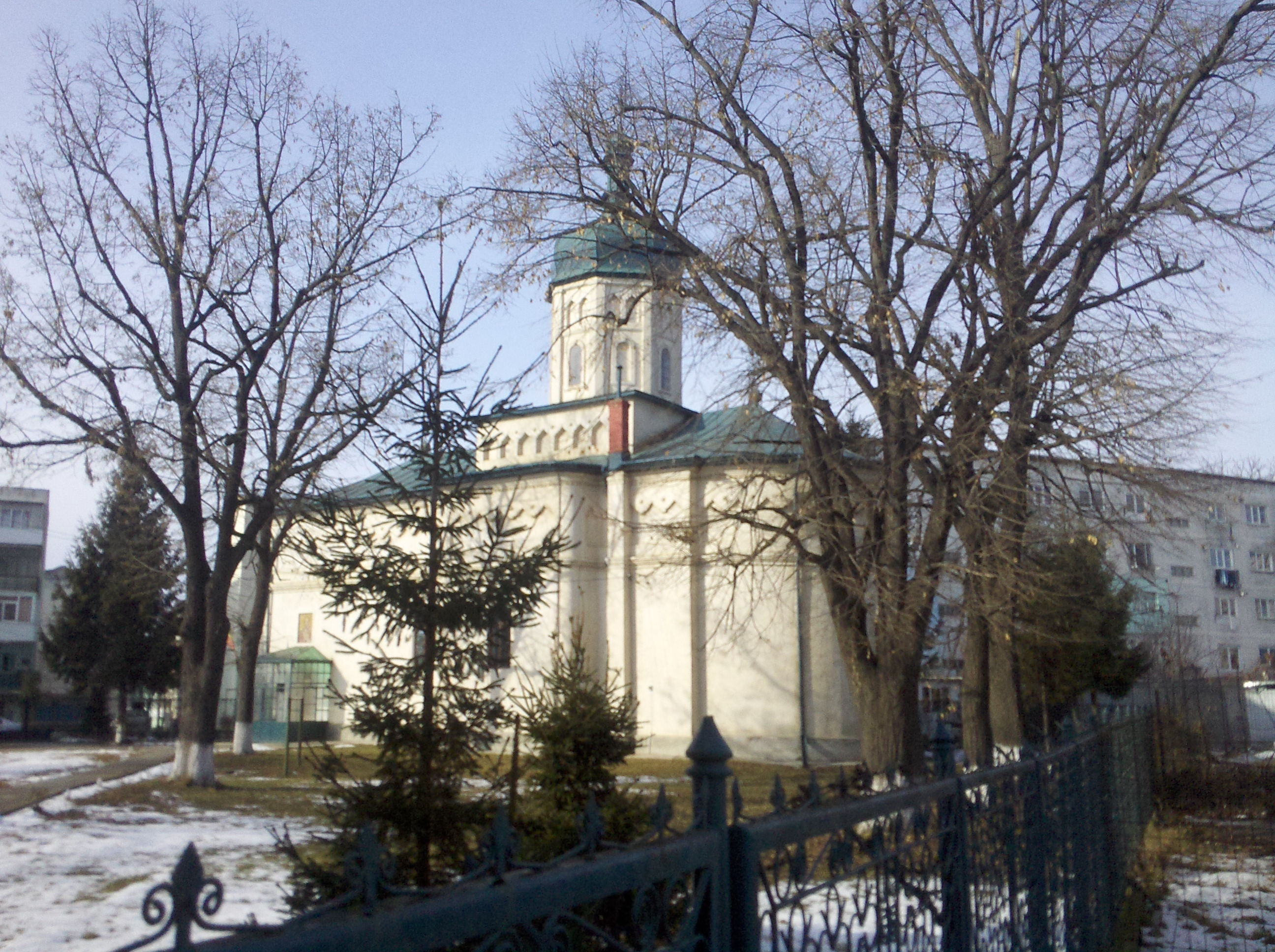 esglesia Sant Nicolas de Roman, Romania